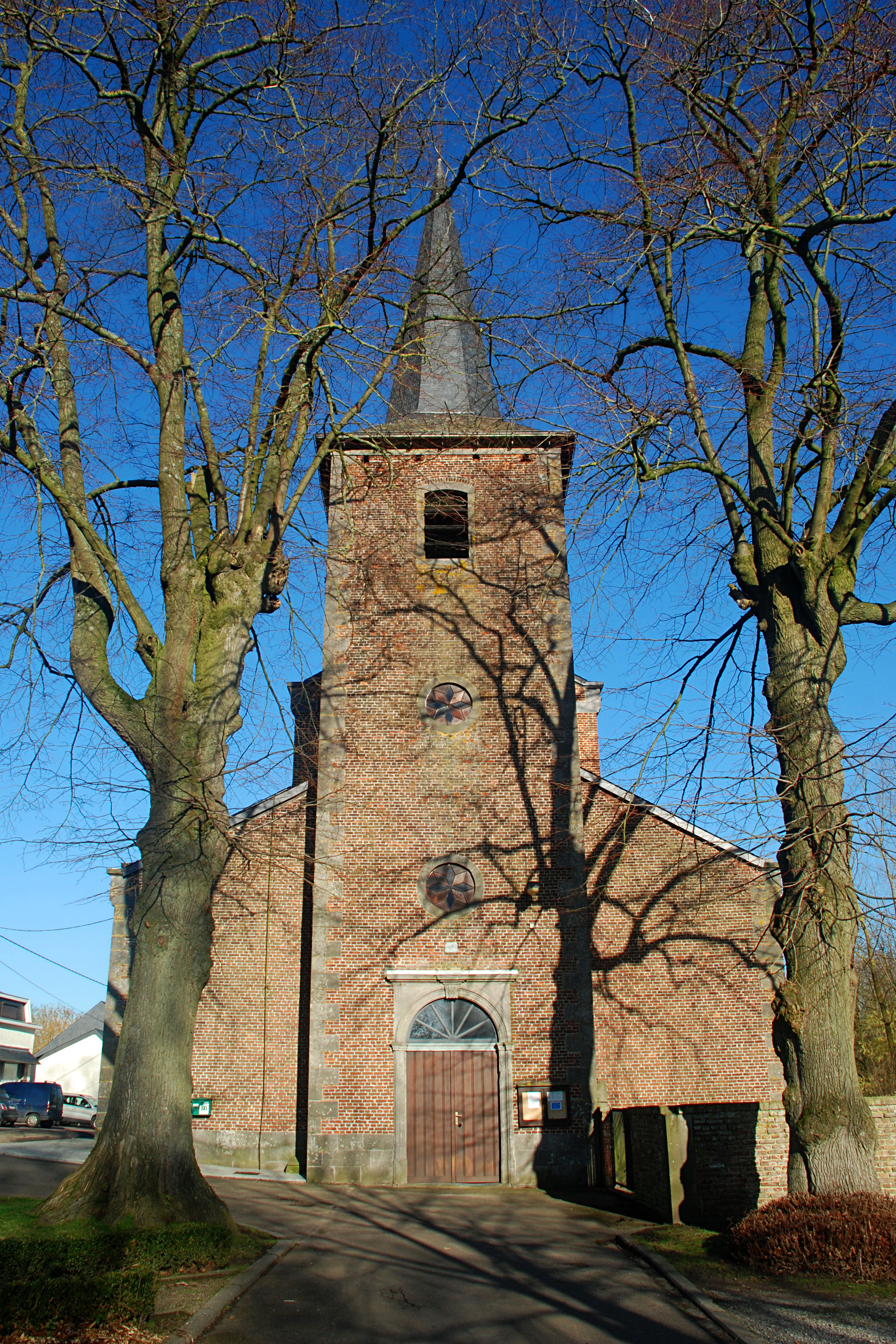 Belgique - Brabant wallon - Chastre - Église Sainte-Gertrude de Gentinnes